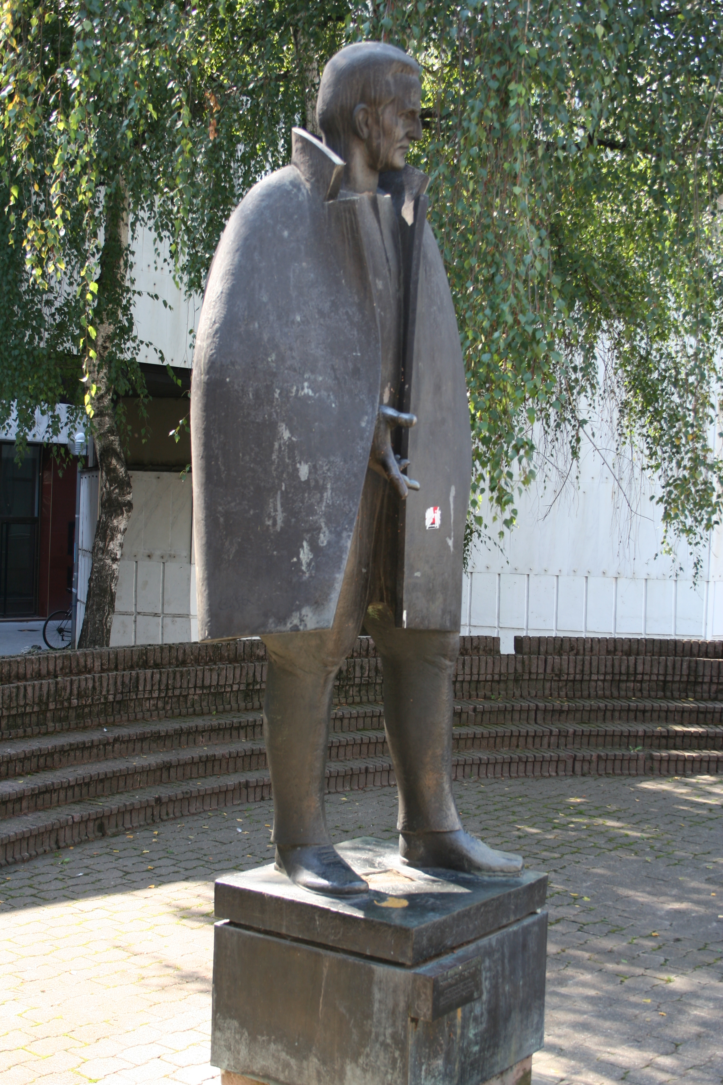 Spomenici Valjevo